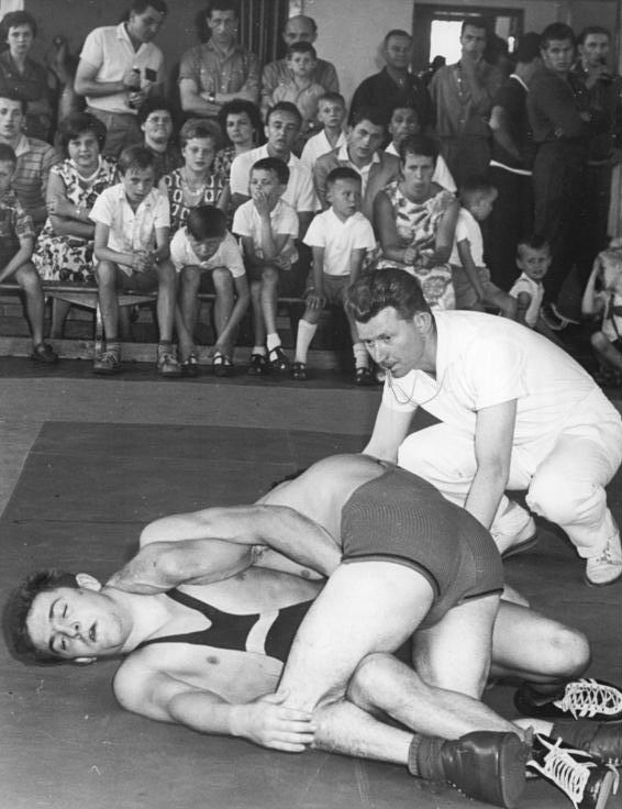 Fred Kämmerer, Schaarschmidt Zentralbild Gahlbeck 8.7.63 Deutsche Meisterschaften im Freistilringen 1963 Gutes Niveau und mit 142 Aktiven eine außerordentlich starke Besetzung hatten die Deutschen Meisterschaften im Freistilringen , die vom 5.-7.Juli 1963 in Aue (Bez.Karl-Marx-Stadt) ausgetragen wurden. UBz: Im Federgewicht konnte Fred Kämmerer (Aktivist Geiseltal) seinen Meistertitel erfolgreich verteidigen. Hier ringt er mit Schaarschmidt (Leipzig-unten).